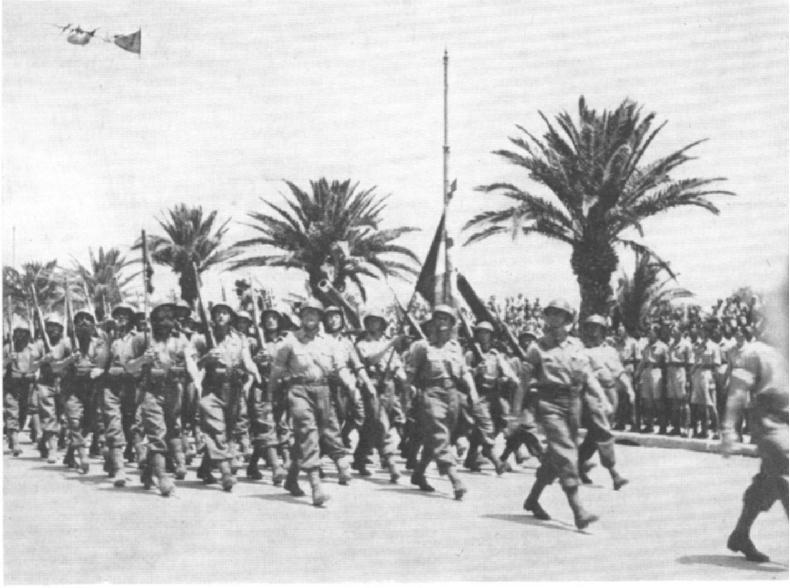 Le défilé de la libération, Tunis, Tunisie